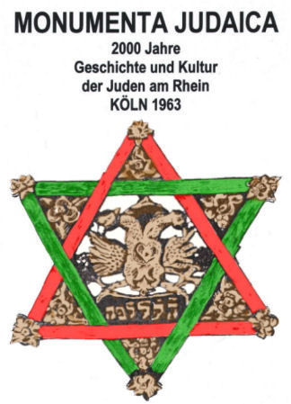 Dieser rot-grüne Davidstern gehört zur jüdischen Kunst. Er wurde 1963 in Köln ausgestellt und schmückte den Ausstellungskatalog.